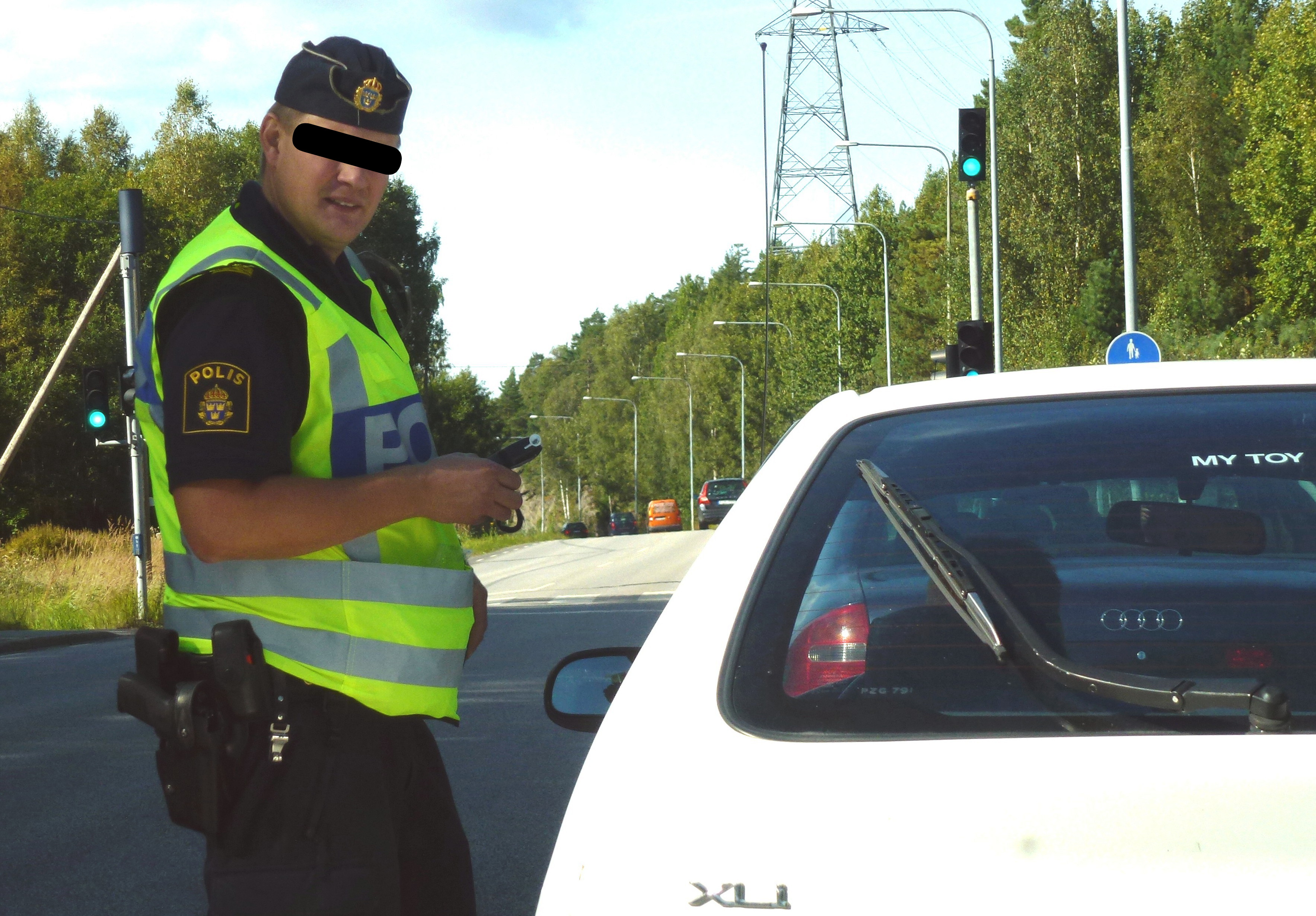 Nykterhetskontroll i Huddinge